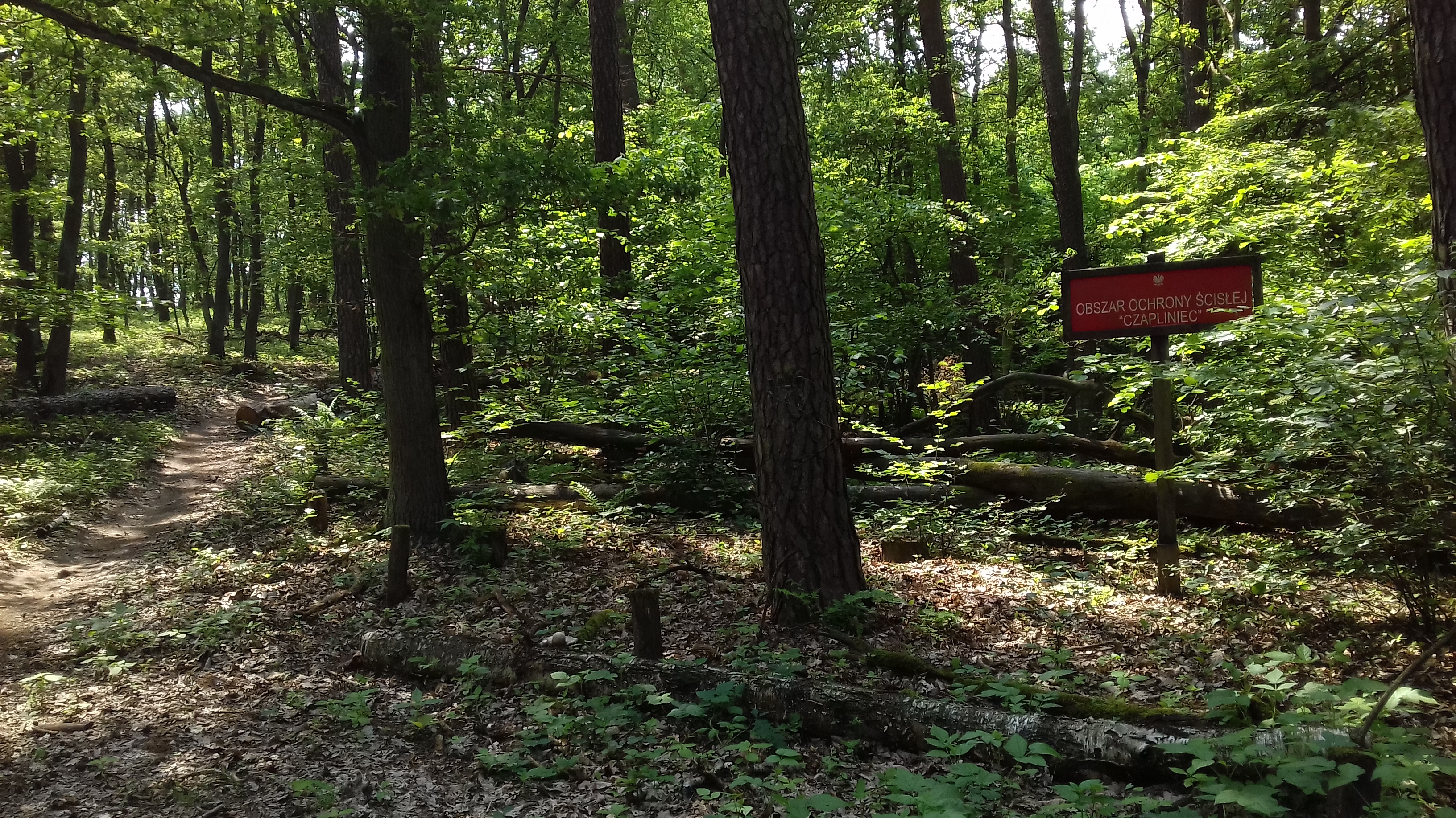 Obszar ochrony ścisłej Czapliniec w Wielkopolski Parku Narodowym - tabliczka przy szlaku pieszym nr 3590 (czarnym).